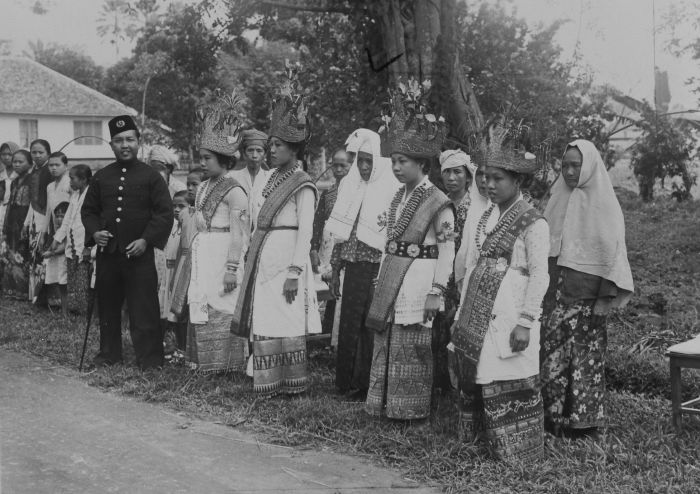 Foto. Erewacht van in traditioneel kostuum gestoken vrouwen in Natar op Sumatra, tijdens een bezoek van Gouverneur-Generaal Tjarda van Starkenborg Stachouwer aan een touwfabriek